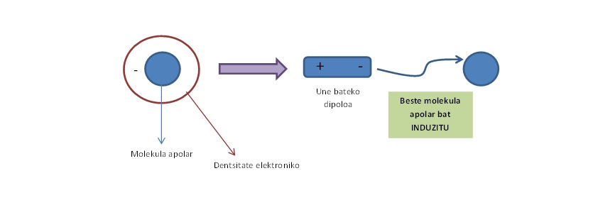 Dispertsio indarrak